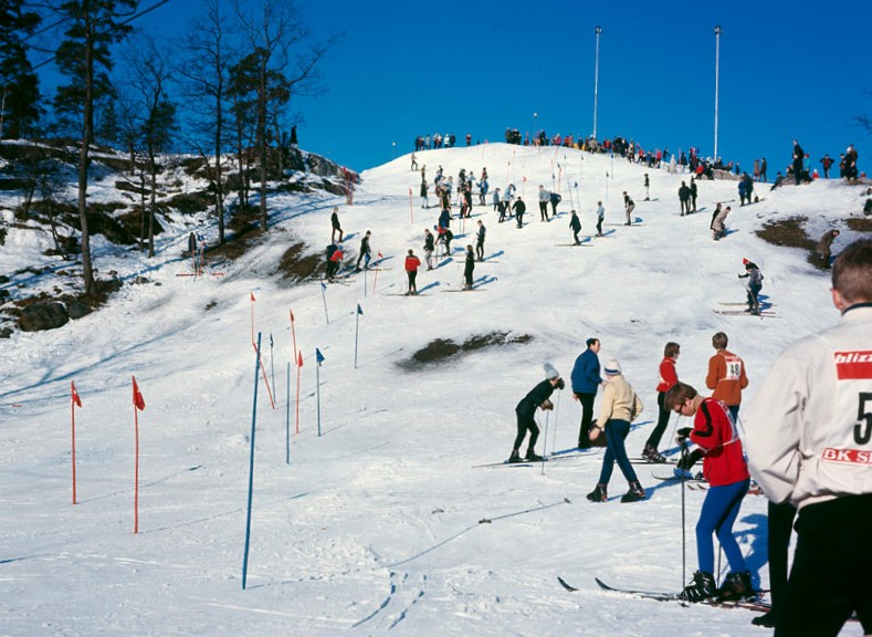 Slalomåkare i backen på Högdalstoppen